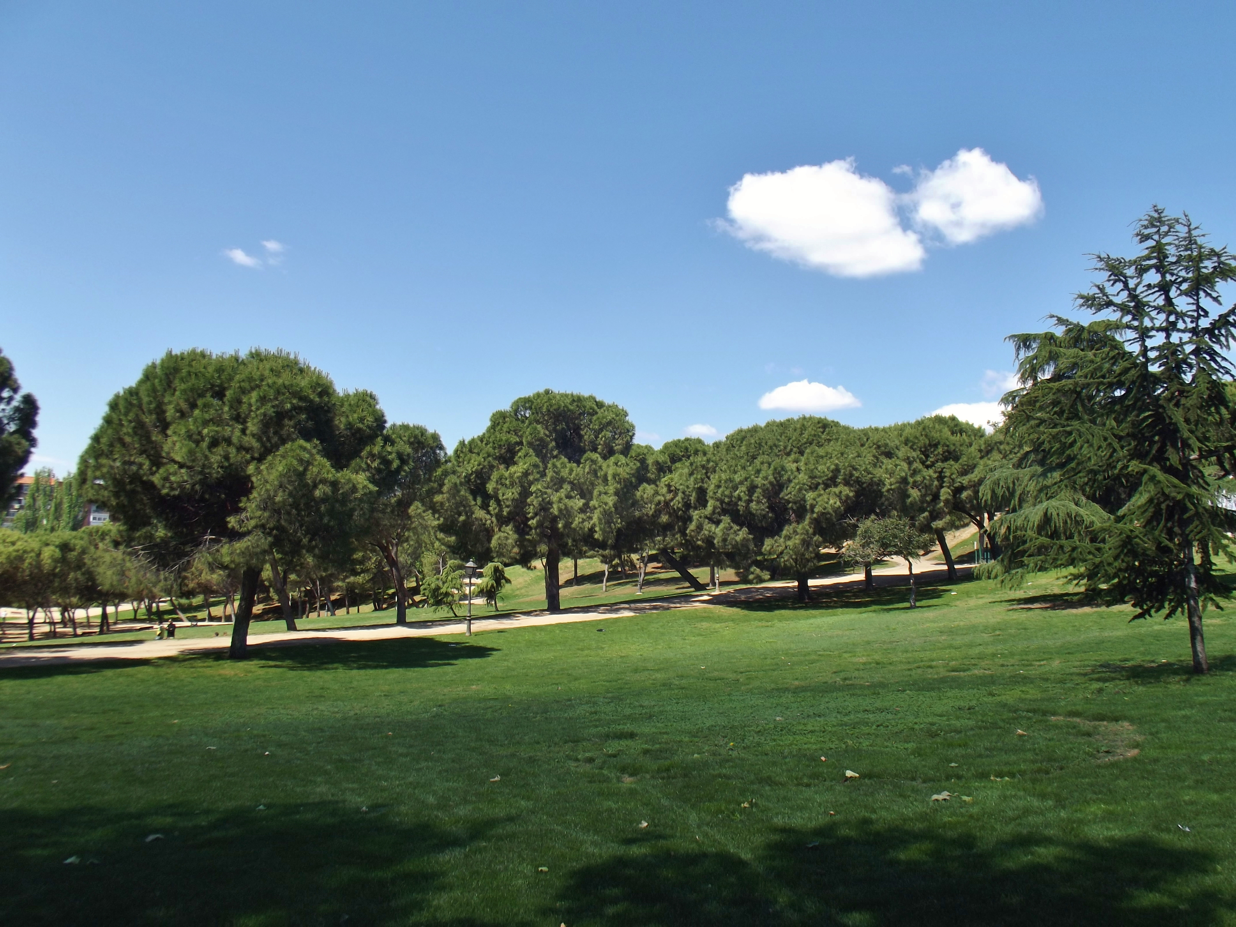 Vista de la Pradera de San Isidro